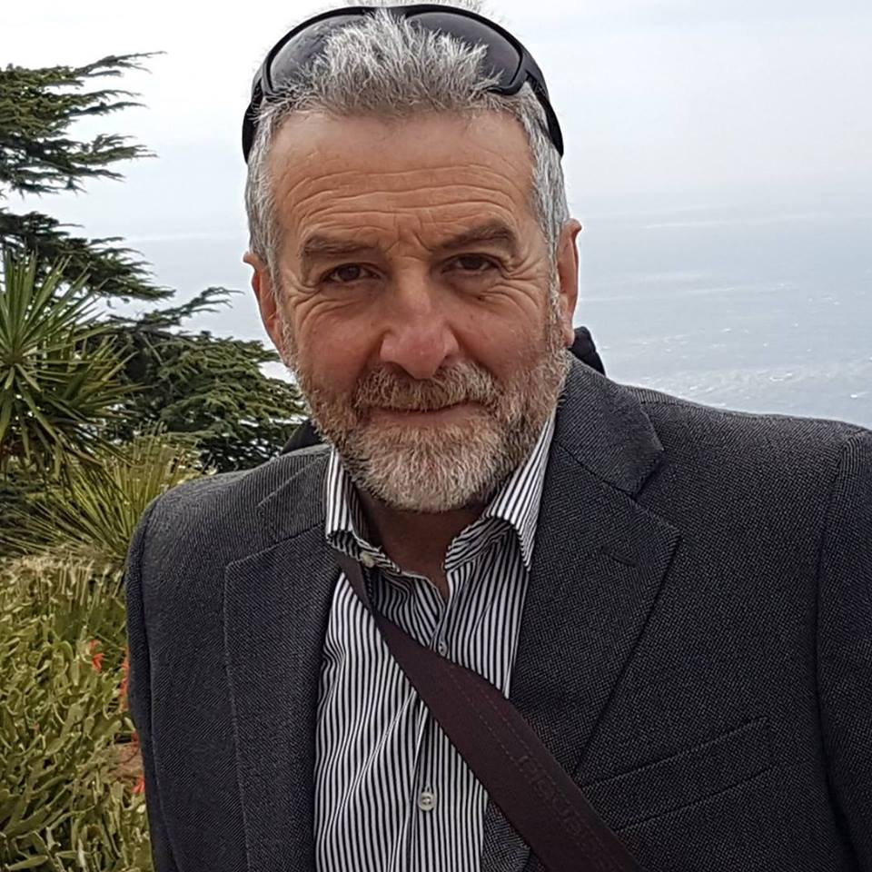 Immagine del profilo